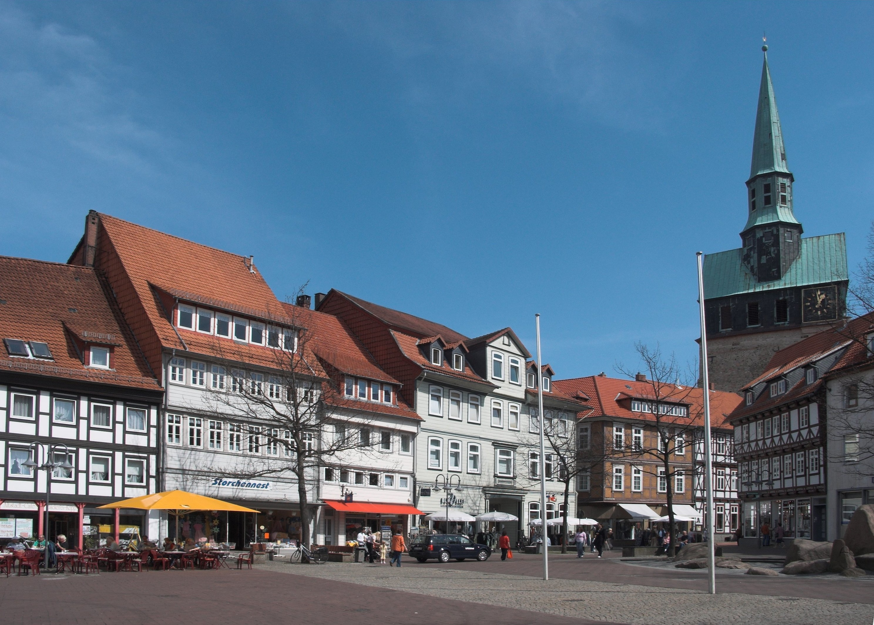 Der Kornmarkt in Osterode am Harz